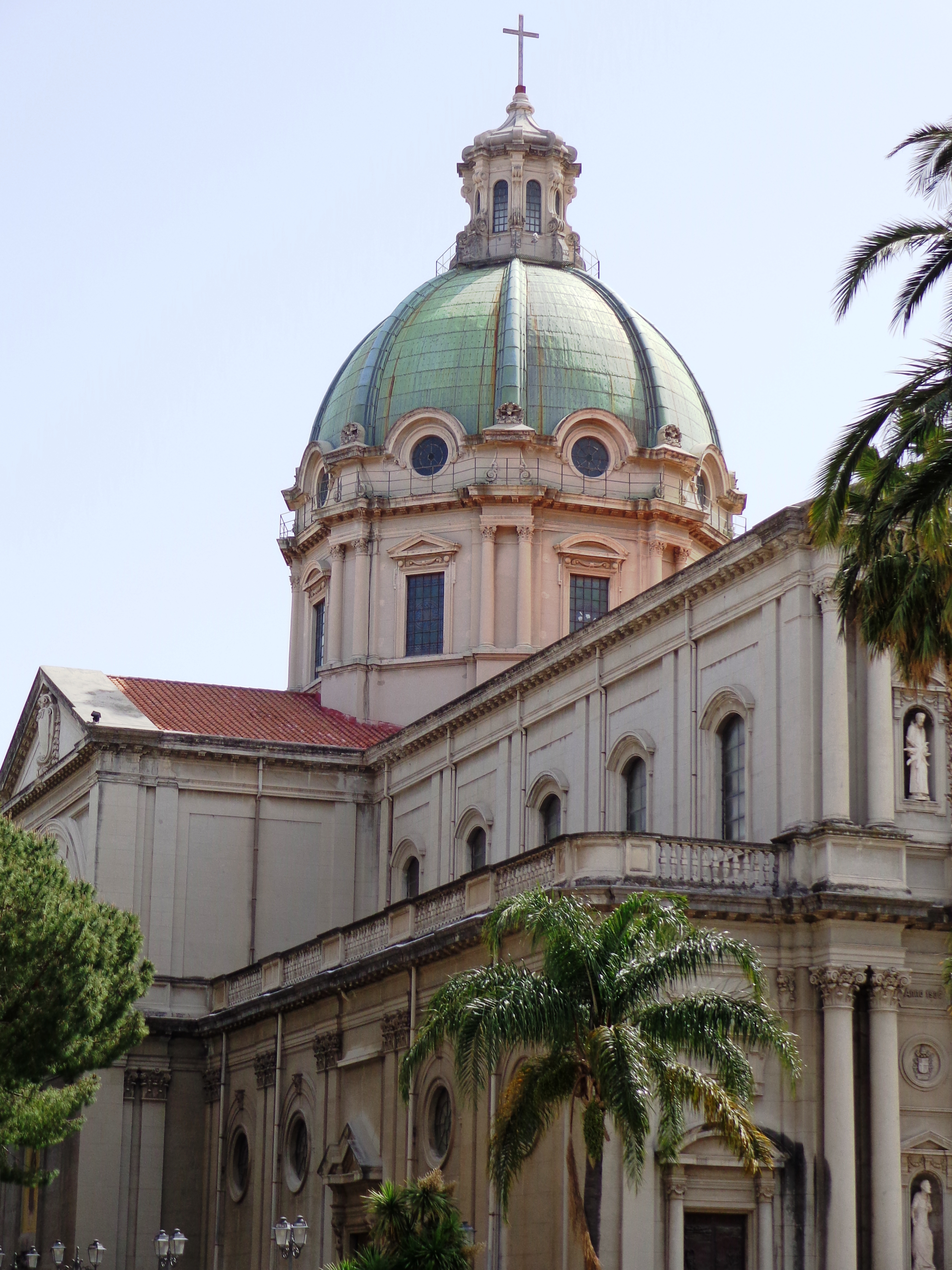 Basilica Minore di San Sebastiano Barcellona Pozzo di Gotto, lato Nord.